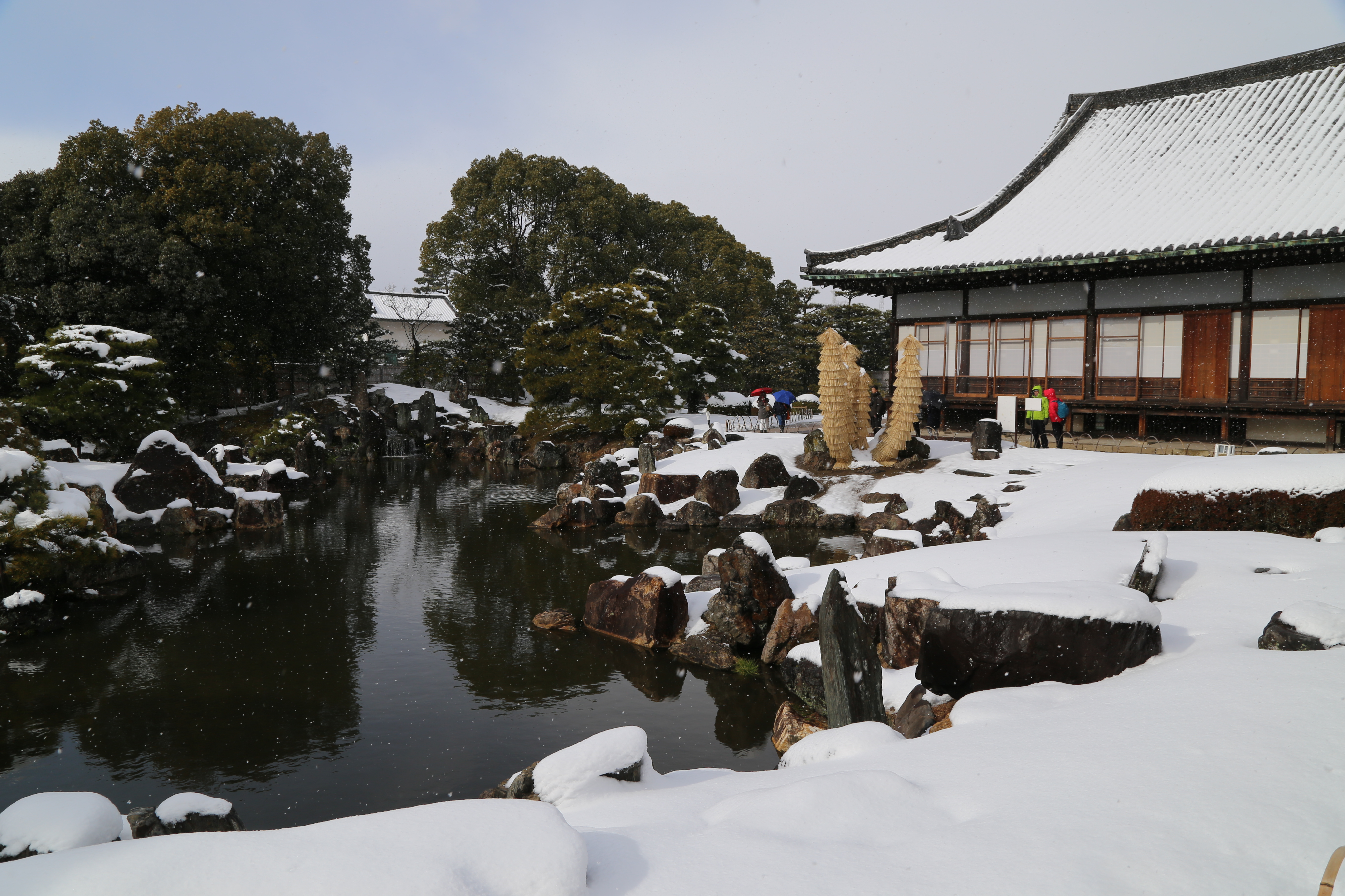 눈내린 니조성 니노마루 정원